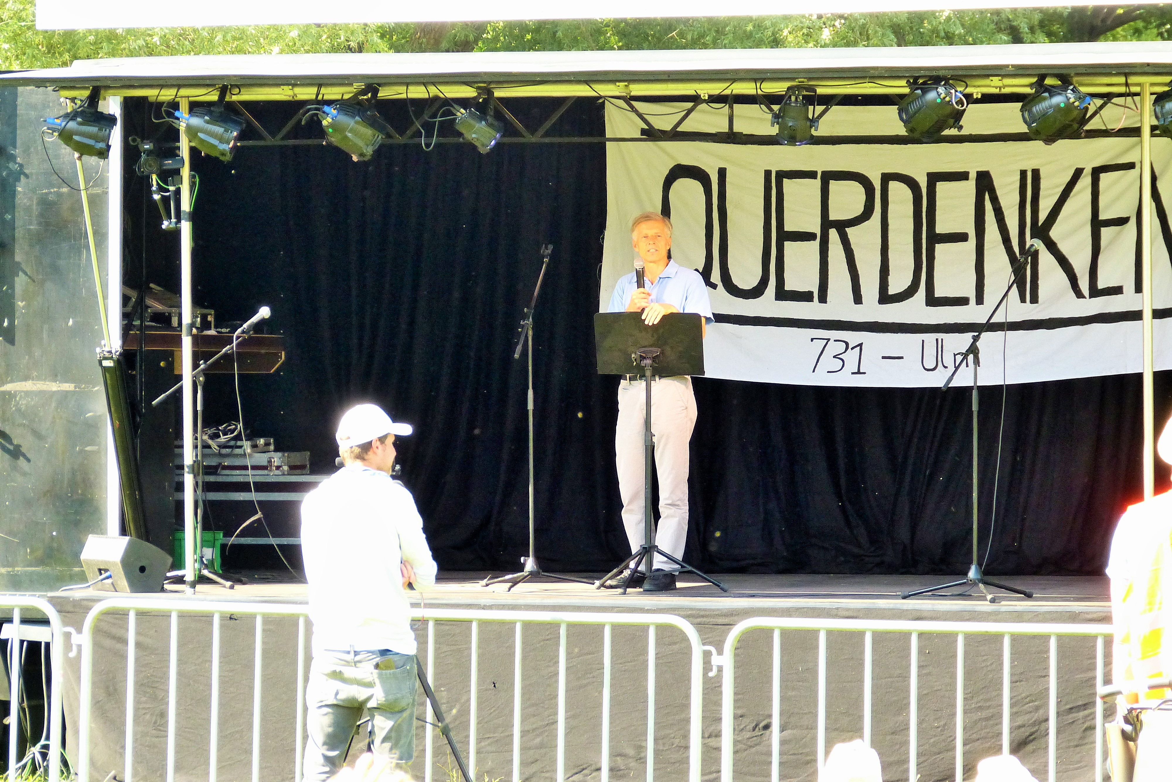 Ulm; 2020